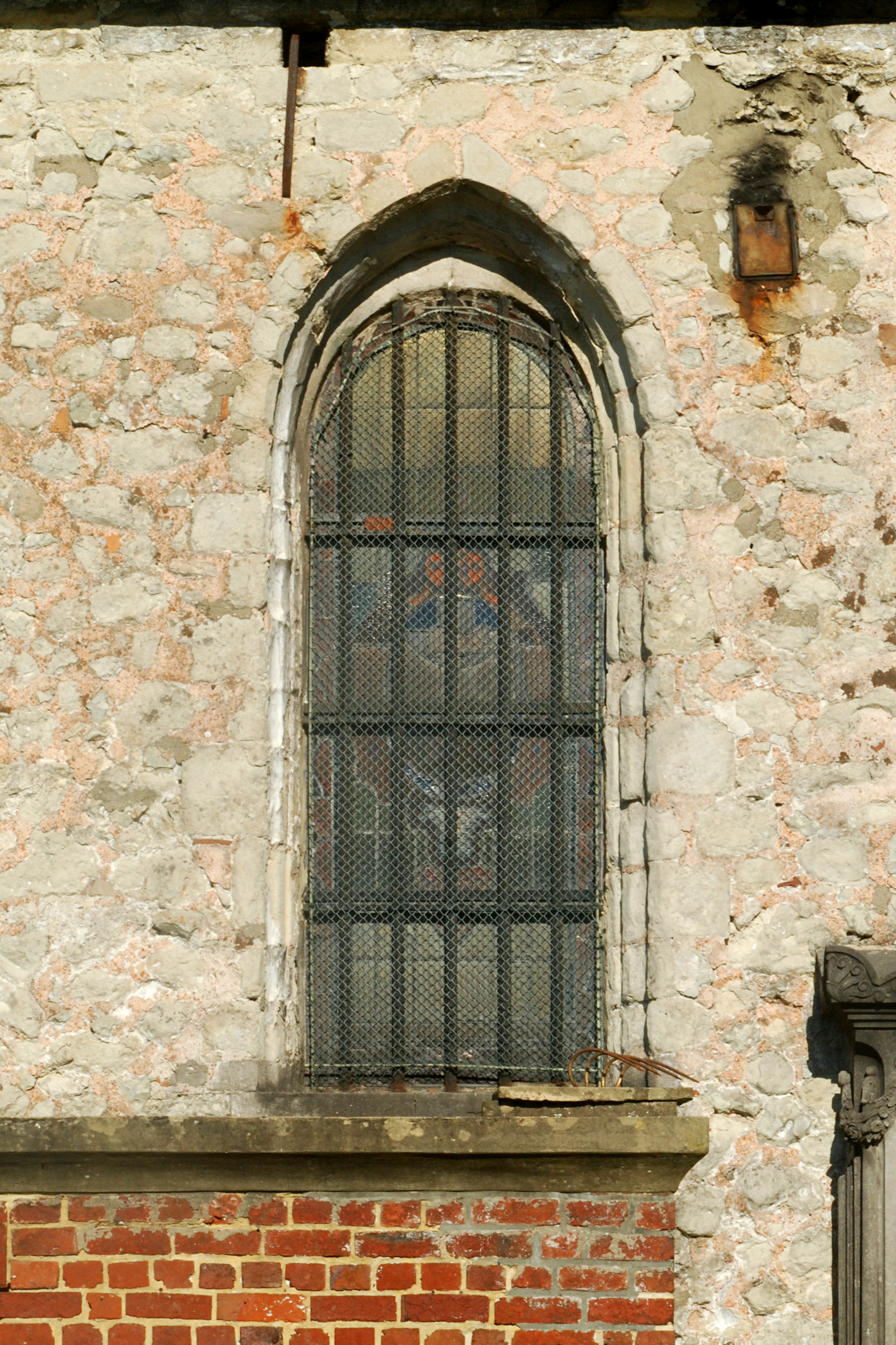 Belgique - Brabant wallon - Nivelles - Eglise Sainte-Marguerite de Thines